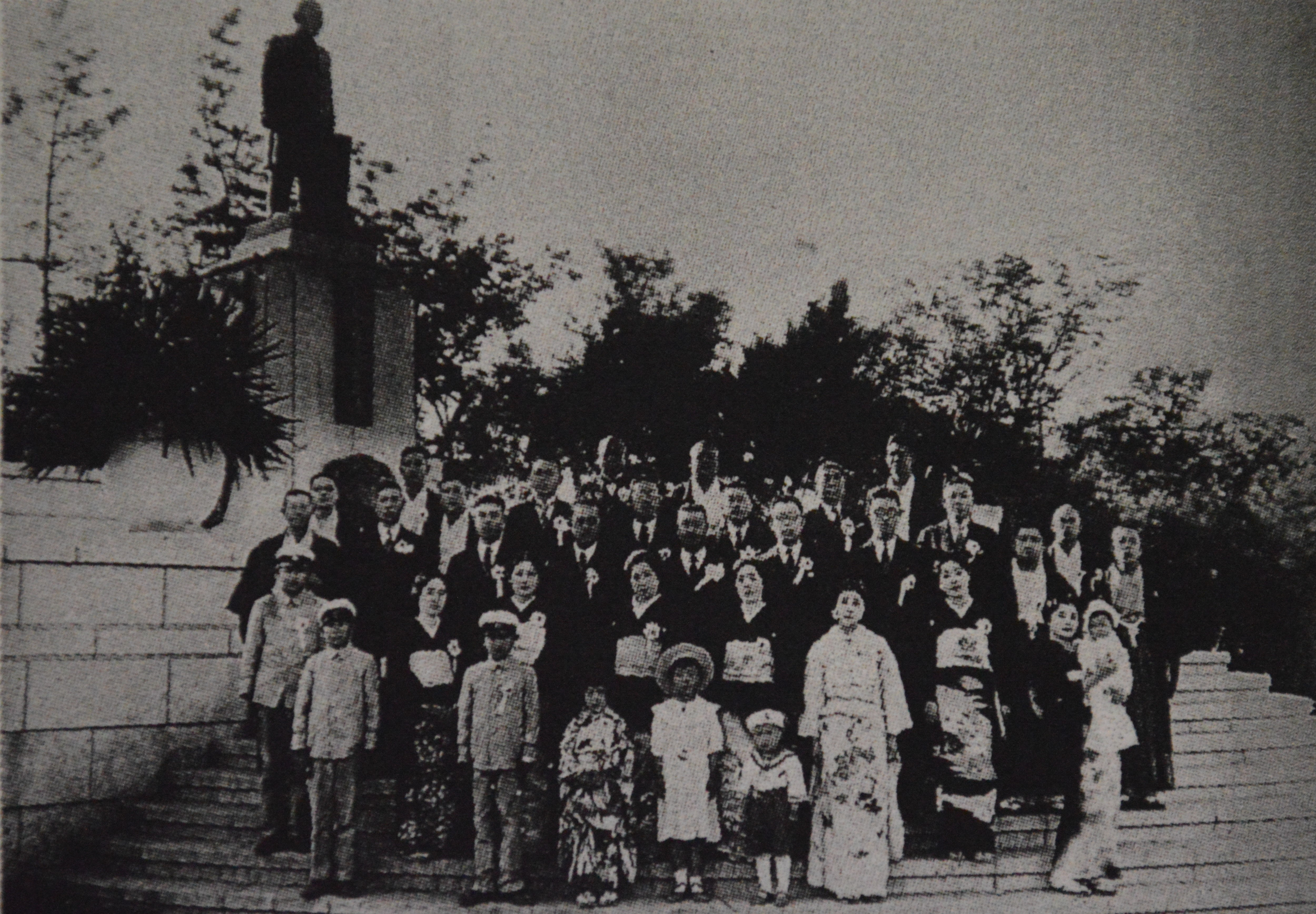 1936年に行われた片岡春吉の銅像の除幕式。海部郡津島町（現・津島市）の天王川公園。